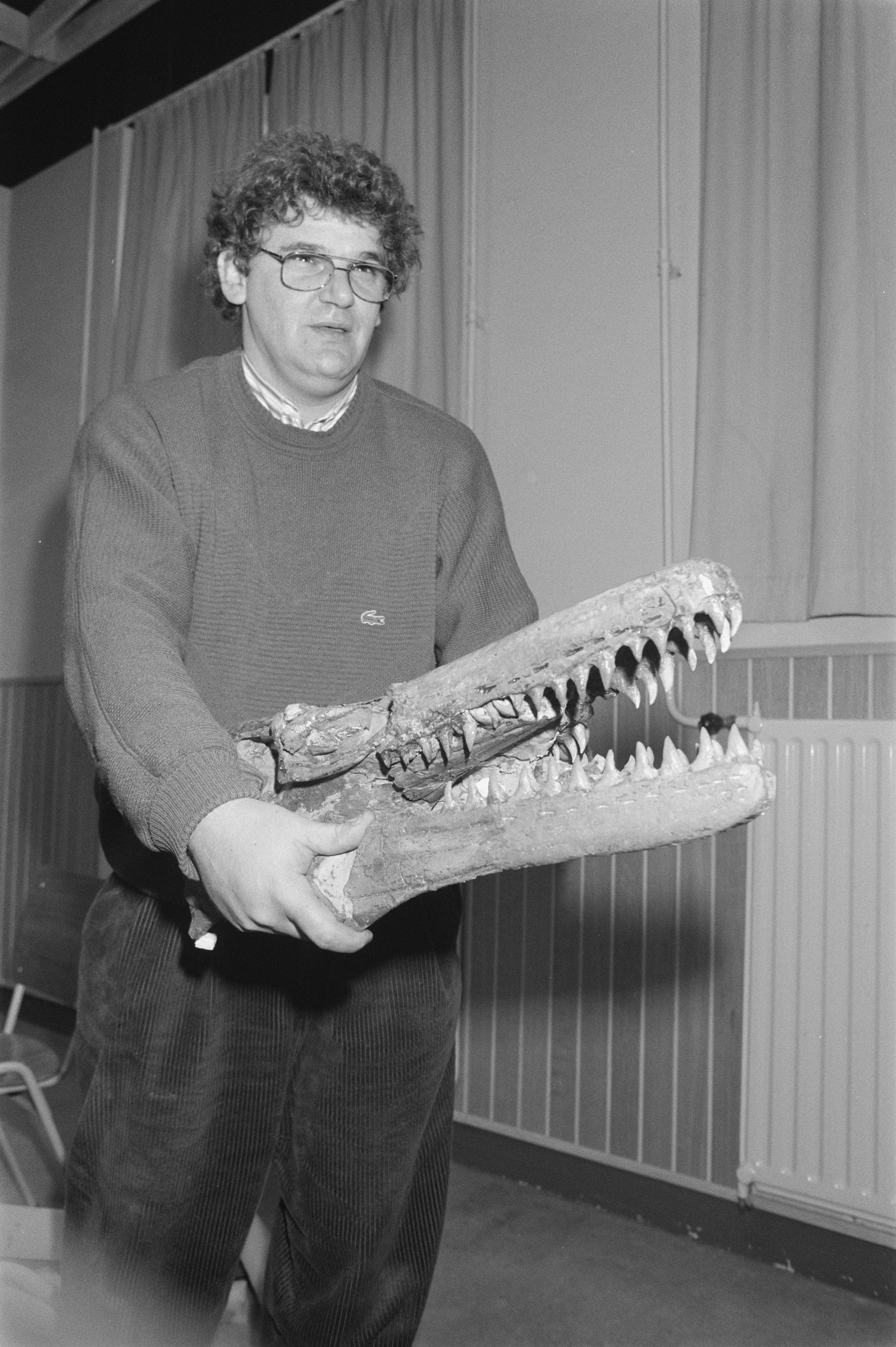 Museum Mineralogie en Geologie in Leiden krijgt skelet van Mosasaurus, de kop wordt uitgepakt